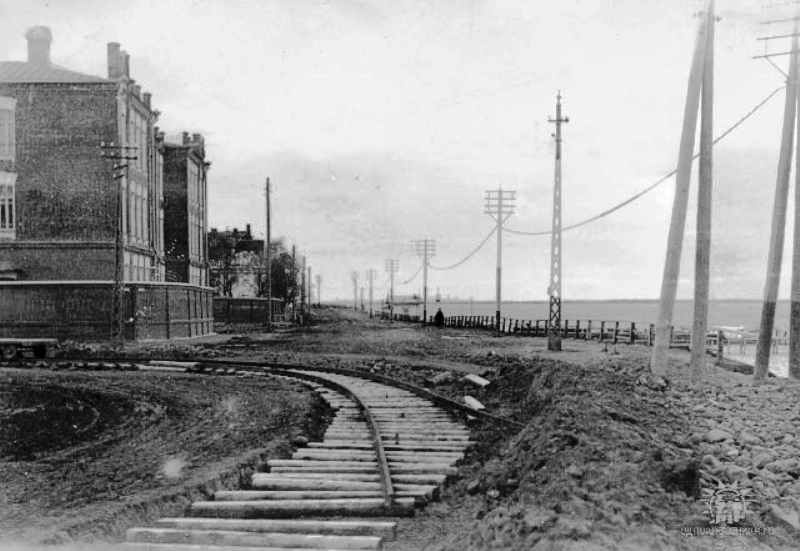 Строительство электрической трамвайной сети 1914-1916